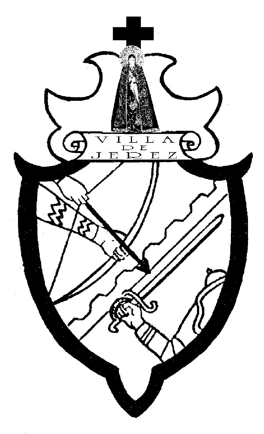 Escudo de la ciudad de Jerez, Zacatecas